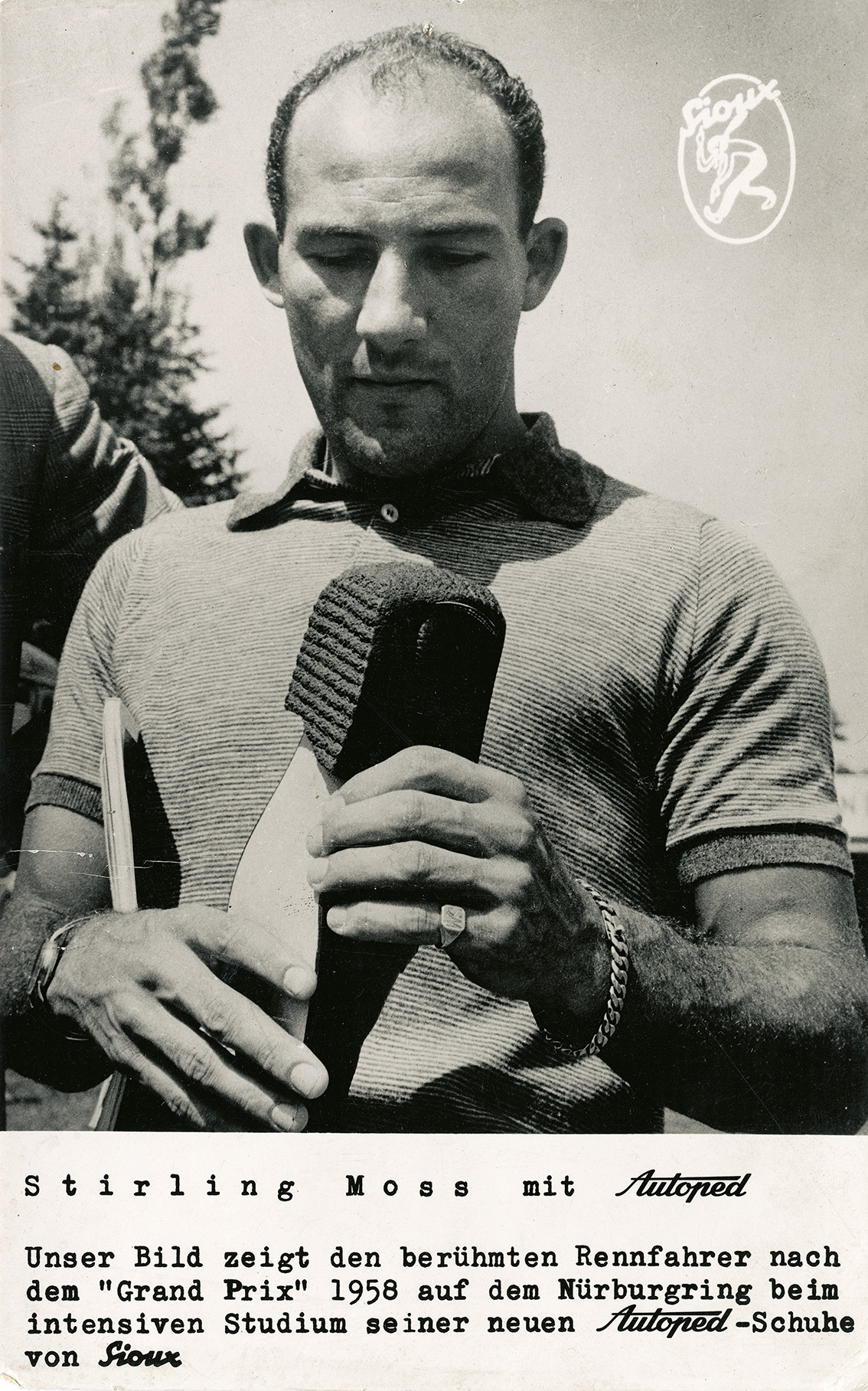 Stirling Moss prüft seinen neuen Sioux Autoped nach dem Grand Prix auf dem Nürburgring 1958.